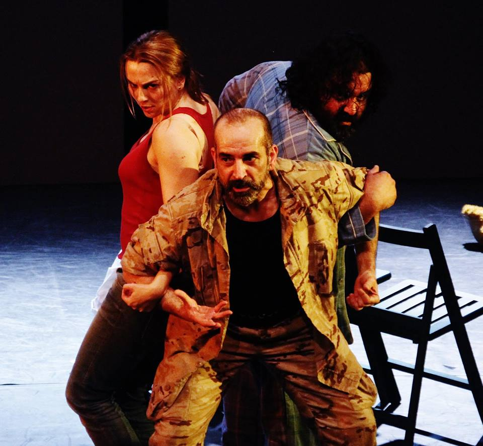 Bea Campos, Xoán Abreu e Marcos Alonso en Como sobrevivir a unha apocalipse zombi, de Avento Producións